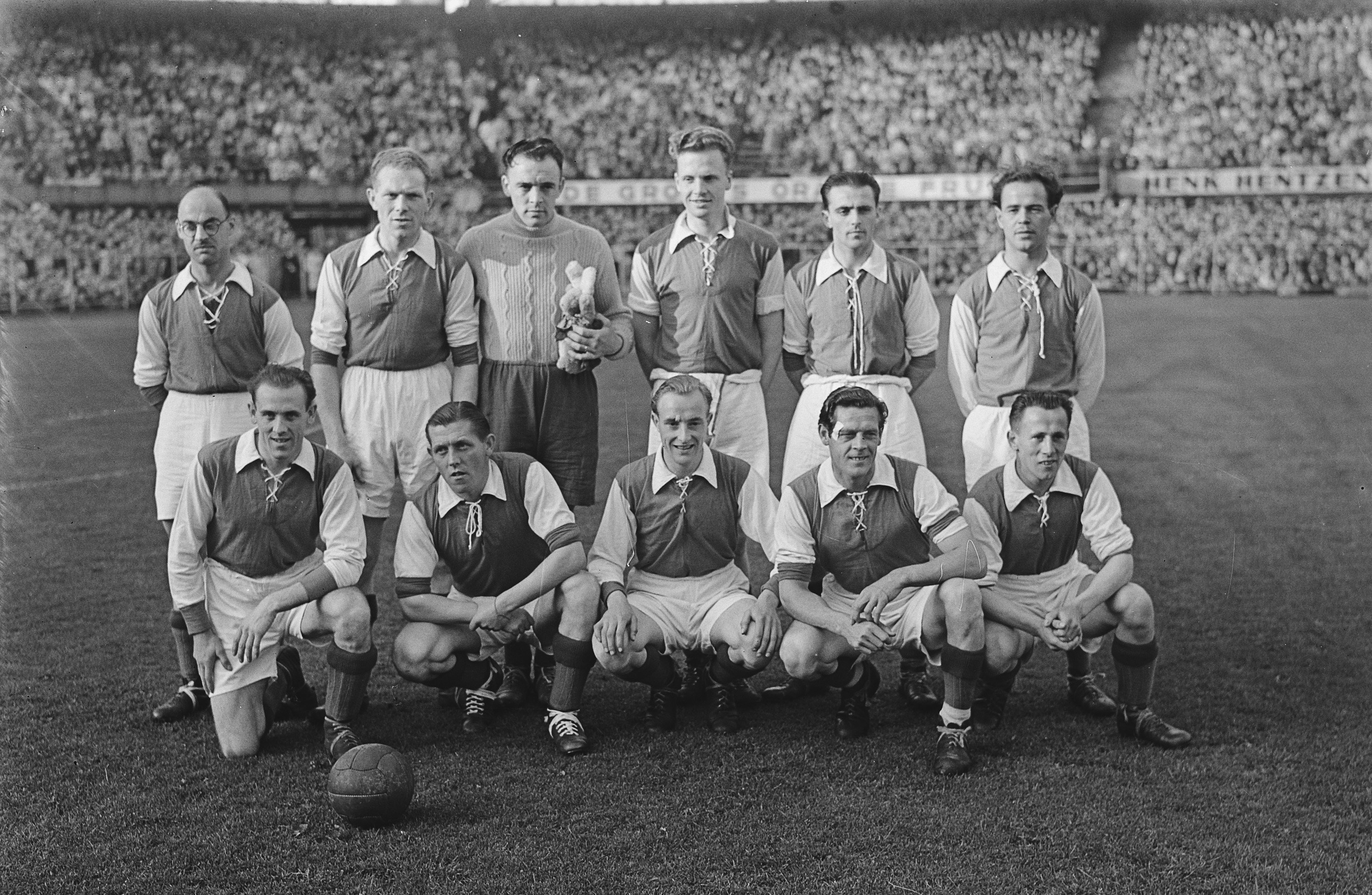 Collectie / Archief : Fotocollectie Anefo Reportage / Serie : [ onbekend ] Beschrijving : SVV-Heerenveen 3-1 SVV-kampioenselftal. Het kampioenselftal bestond uit Henk Opschoor, André Corveleijn, Frans Steenbergen, Joop van Meerwijk, Jan van Schijndel, Flip van Kan, Jan Schrumpf, Arij de Bruijn, Henk Könemann, Rinus Gosens en Arie van Lith. Datum : 3 juni 1949 Fotograaf : Noske, J.D. / Anefo Auteursrechthebbende : Nationaal Archief Materiaalsoort : Glasnegatief Nummer archiefinventaris : bekijk toegang 2.24.01.09 Bestanddeelnummer : 903-4152